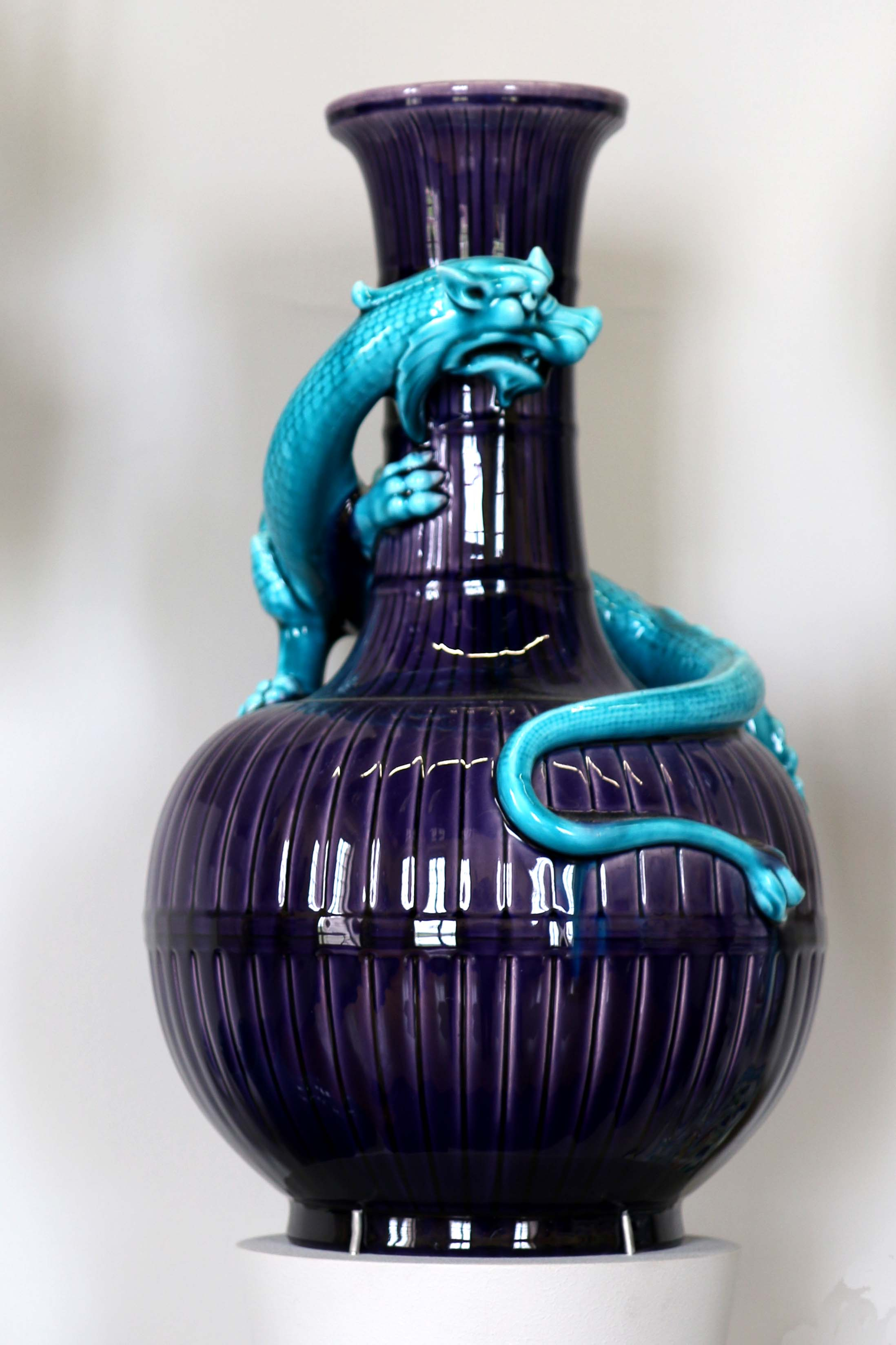 Faïence de Théodore Deck au Musée des arts décoratifs de la Faïence et de la mode au château borély à Marseille.